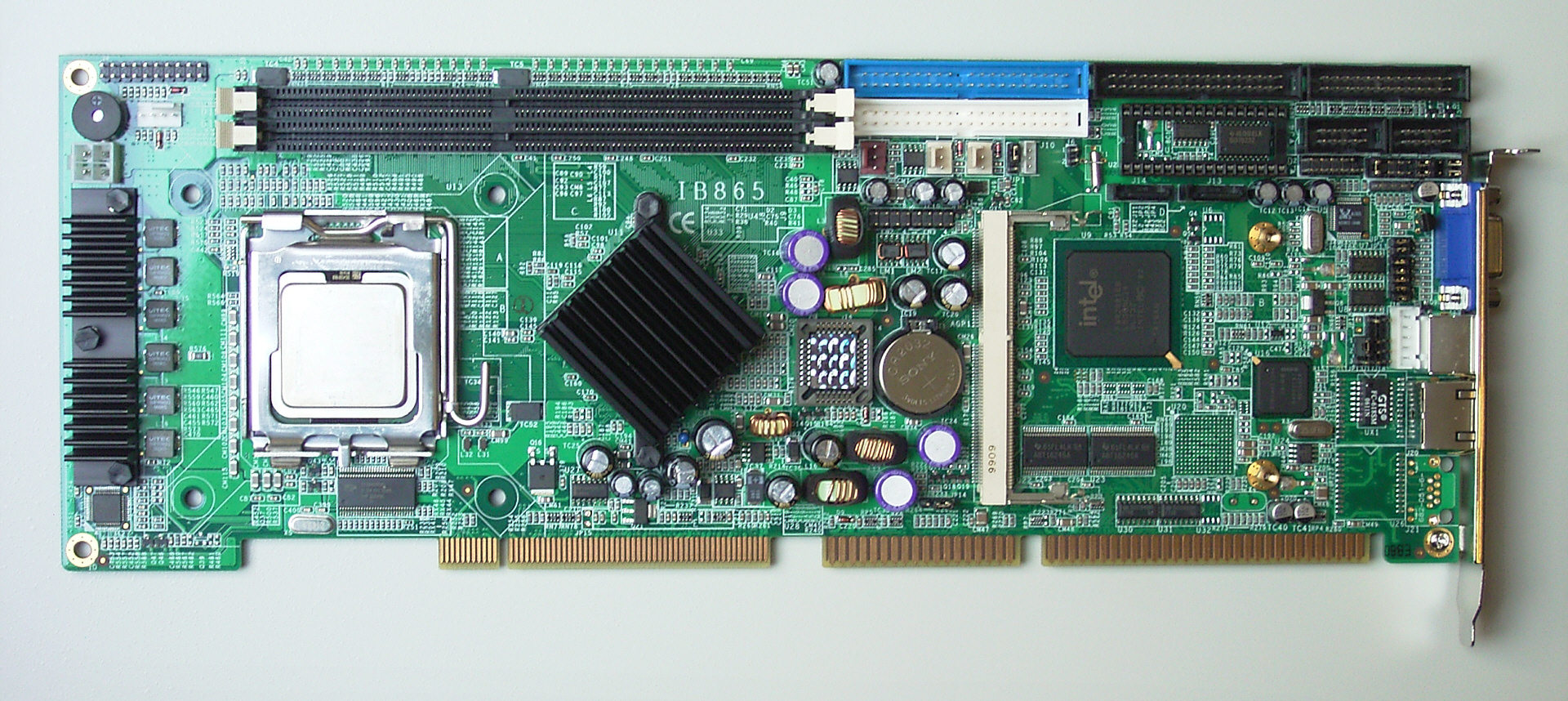 Slot-CPU-Karte für den Einsatz auf einer 19"-Backplane, hier mit Sockel 775 für Intel P4-CPUs (Prozessor eingesetzt, jedoch Kühlkörper noch nicht montiert).